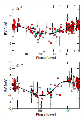 Красными кружками показаны замеры лечевой скорости звезды, полученные на HARPS, серыми ромбами - замеры на HIRES, голубыми квадратами - на PFS. Достаточно высокие погрешности единичных замеров, полученные на HIRES, объясняются тем, что на Гавайях, где расположена обсерватория имени Кека и спектрограф HIRES, звезда Каптейна никогда не поднимается над горизонтом выше 26°.